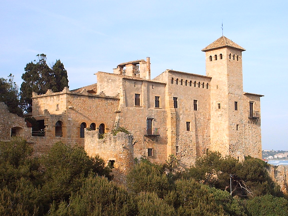 Vista del castell de Tamarit des de la platja